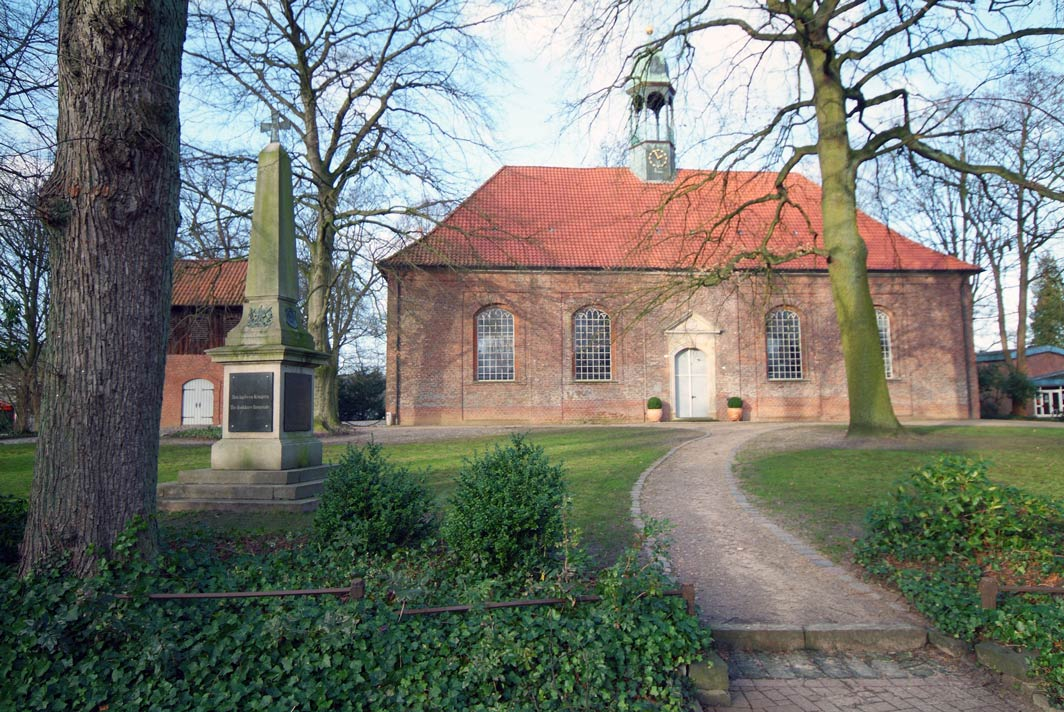 Dorfkirche Horst in Holstein